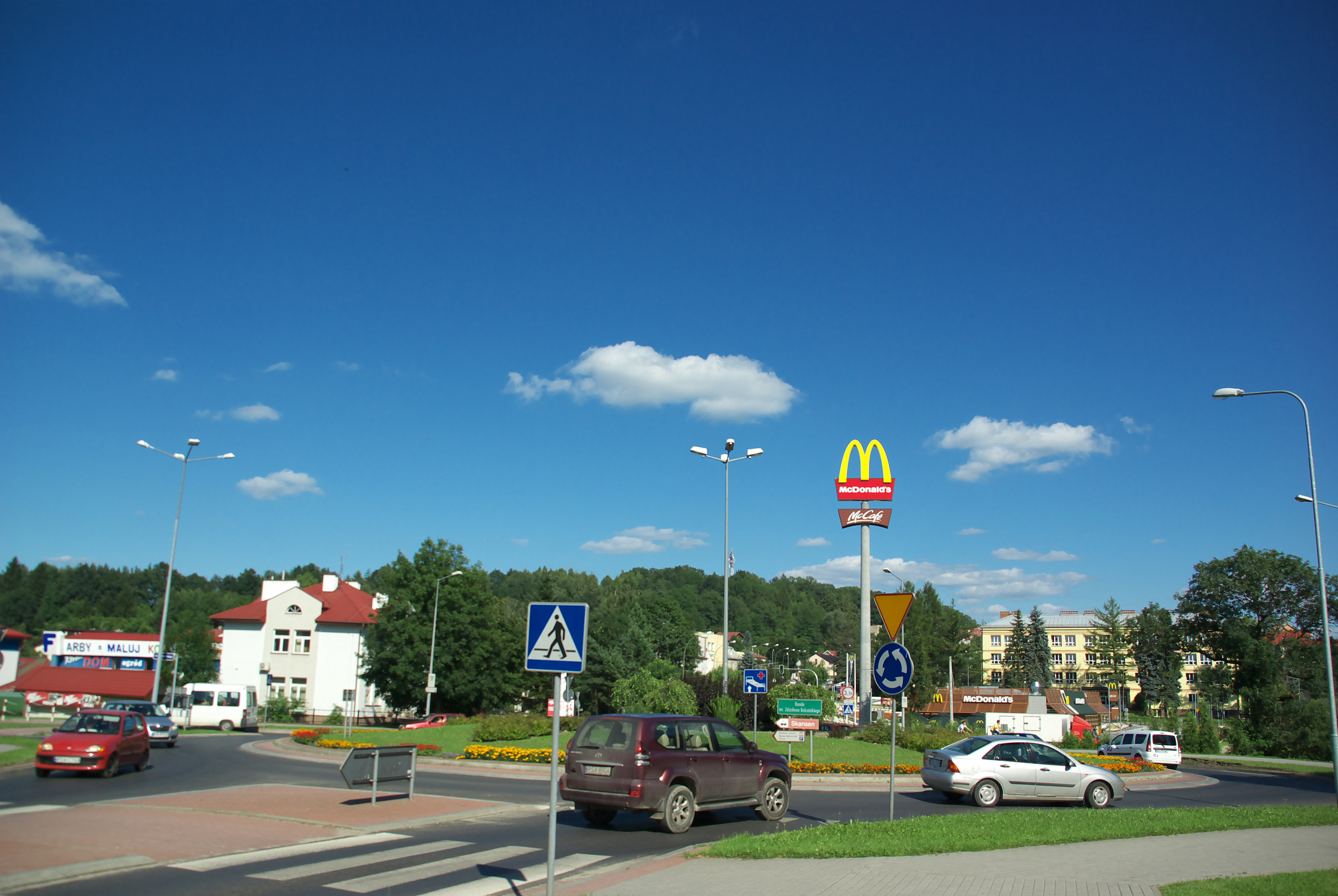 Rondo Beksińskiego (Z.Beksiński Roundabout), Rymanowska Sanok